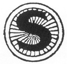 Oud logo van een niet meer bestaand bedrijf Categorie:Afbeelding logo Old logo of a company that doesn't exist anymore